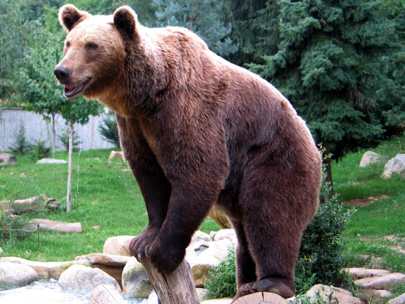 a bear, from the "Parc animalier des Pyrénées"